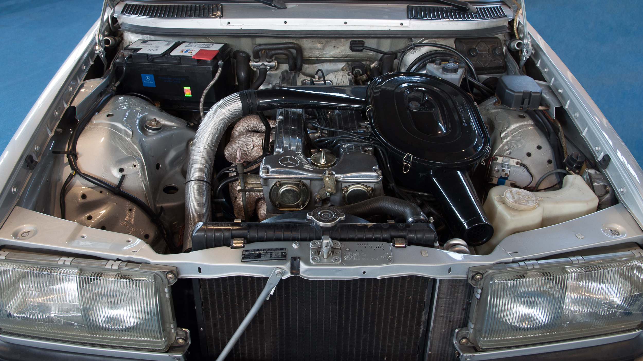 1978 Mercedes-Benz 280 CE W123 M110 AMG leistungsgesteigerter 6-Zylinder Reihenmotor